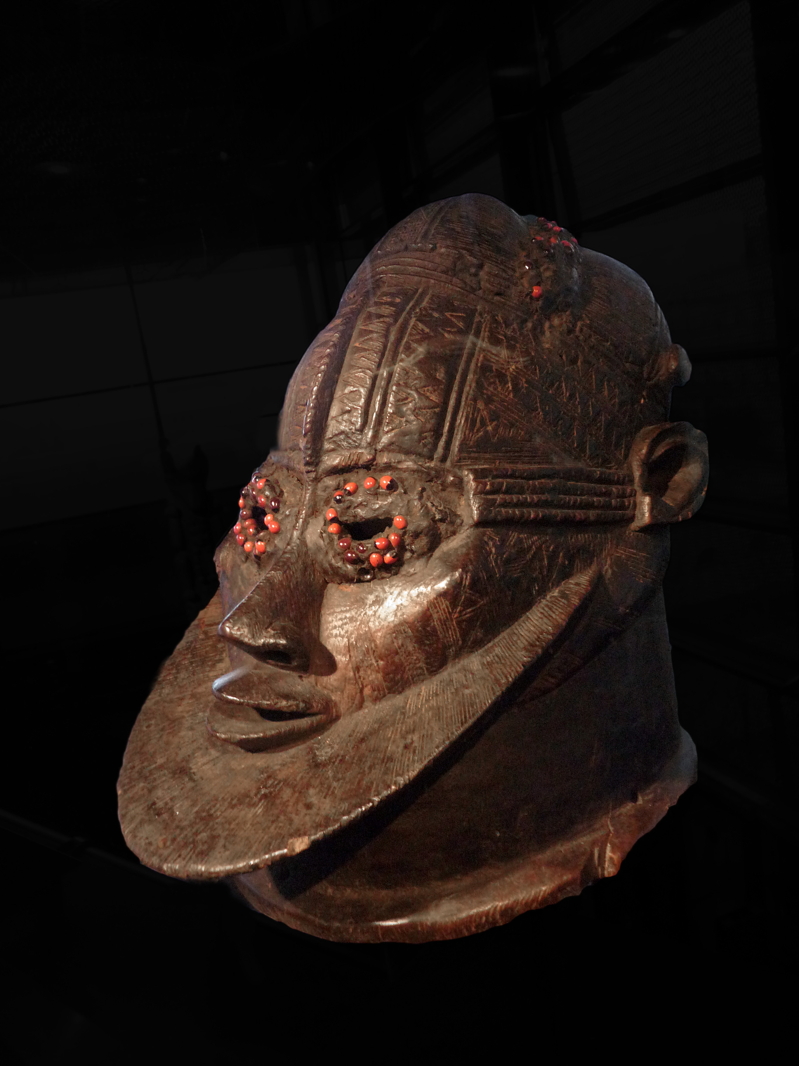 Igala : masque-heaume Epe. Début du XXe siècle. Bois, pigment, graines d'arbres. Collections du musée du quai Branly. Exposition Nigeria. Arts de la vallée de la Bénoué au musée du quai Branly (Paris).